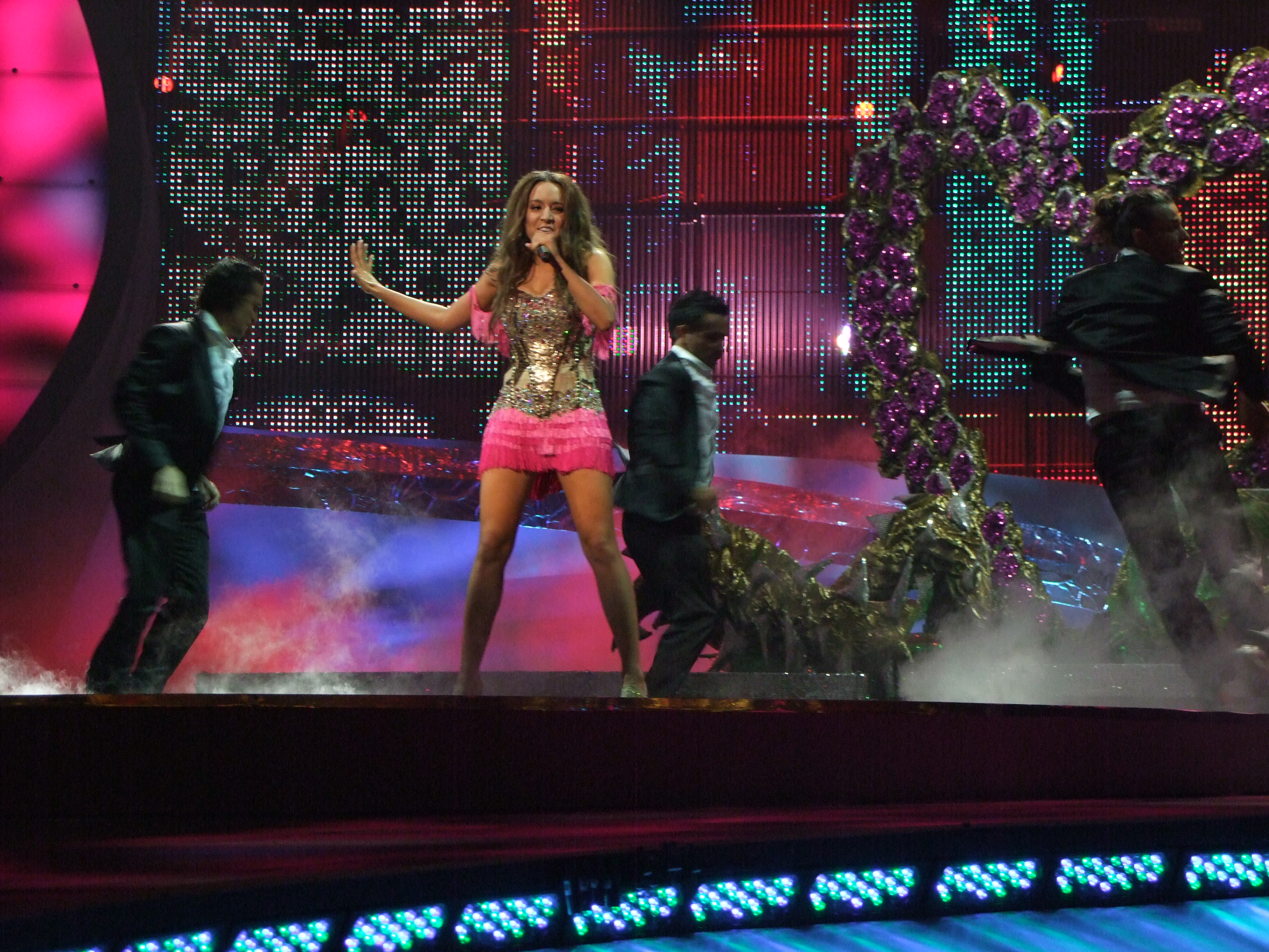 Semifinal 1 EUROVISION 2008